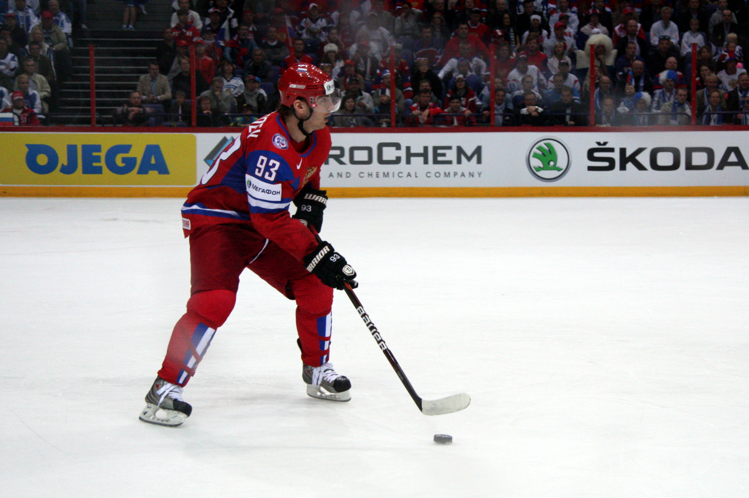 Николай Жердев. ЧМ 2012, Полуфинал, 19.05.2012, Финляндия-Россия, Хельсинки.